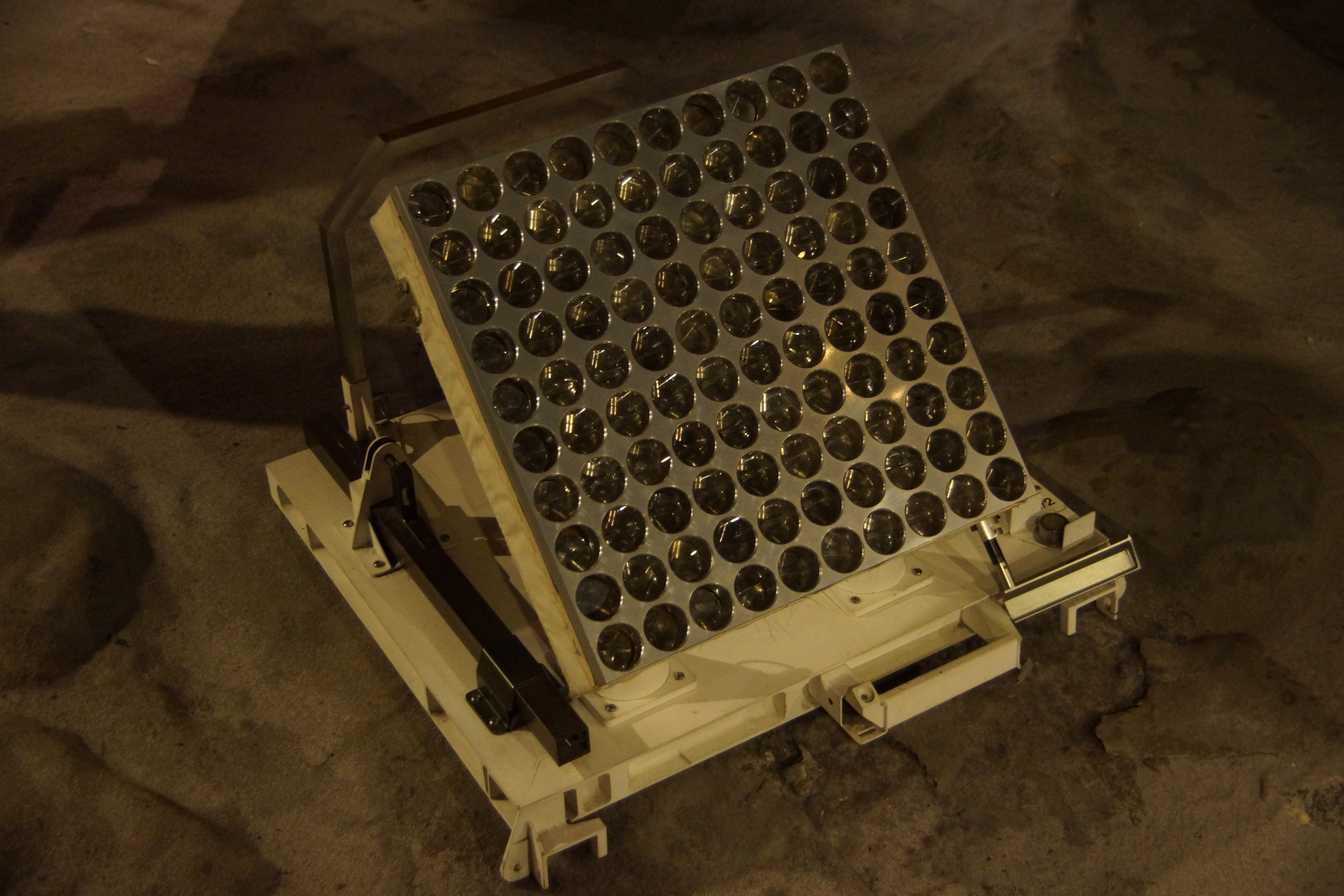 Replik des Laserreflektors von Apollo 11 im Science Museum